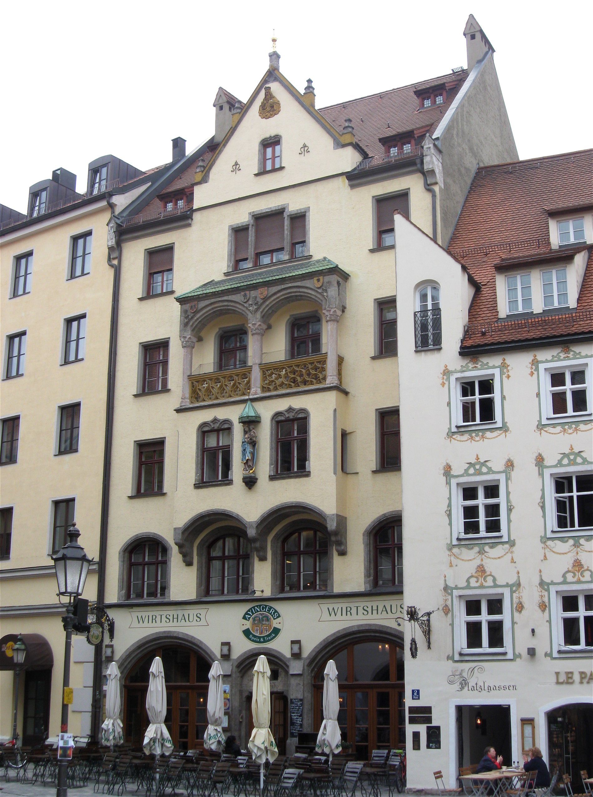 Platzl 1a; Wohn- und Geschäftshaus Kaut, reiche, gotisierende Fassade mit Hausteingliederung und breitem Erker, 1896-97 von Max Ostenrieder.